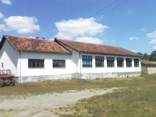 Osnovna skola Krslje